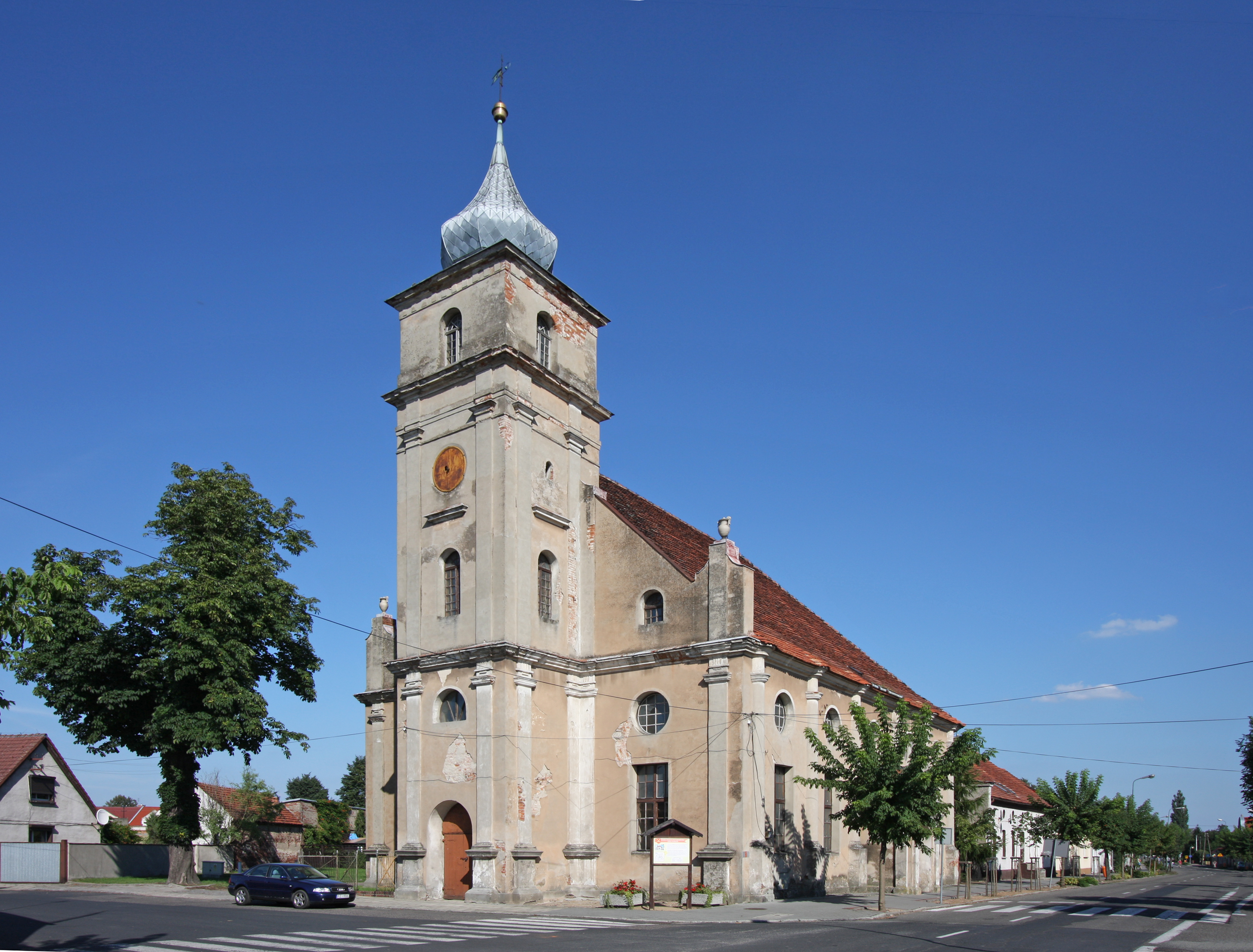 Babimost, dawny kościół ewangelicki przy ul. Kargowskiej